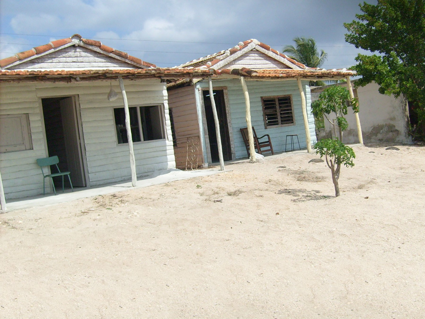 Casas de dos vacacionistas de la Playa Mayabeque: Alberto Piloto Felipe (Monte) y su sobrino Nivaldo (Nivo)